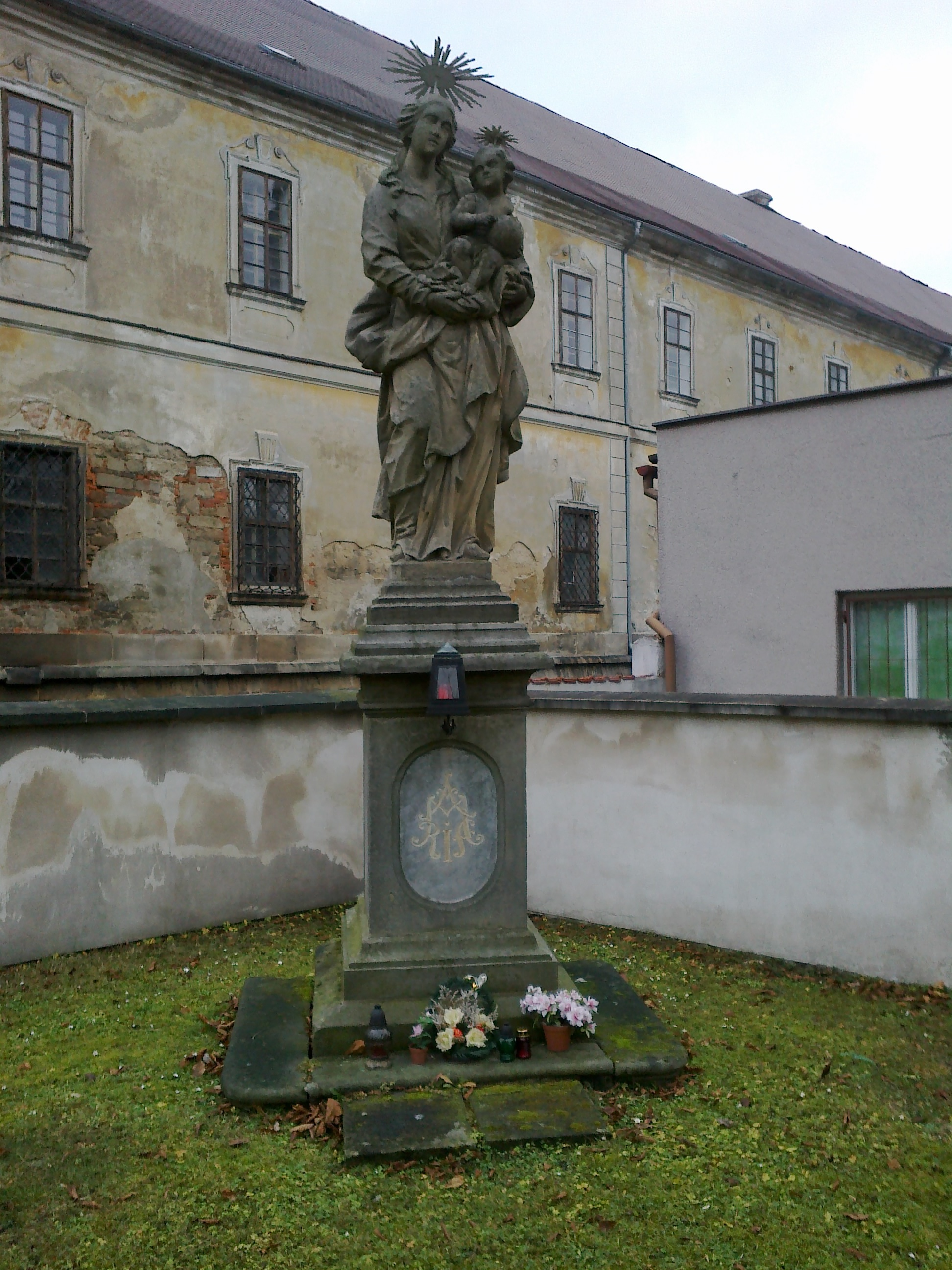 Police nad Metují - socha Madony